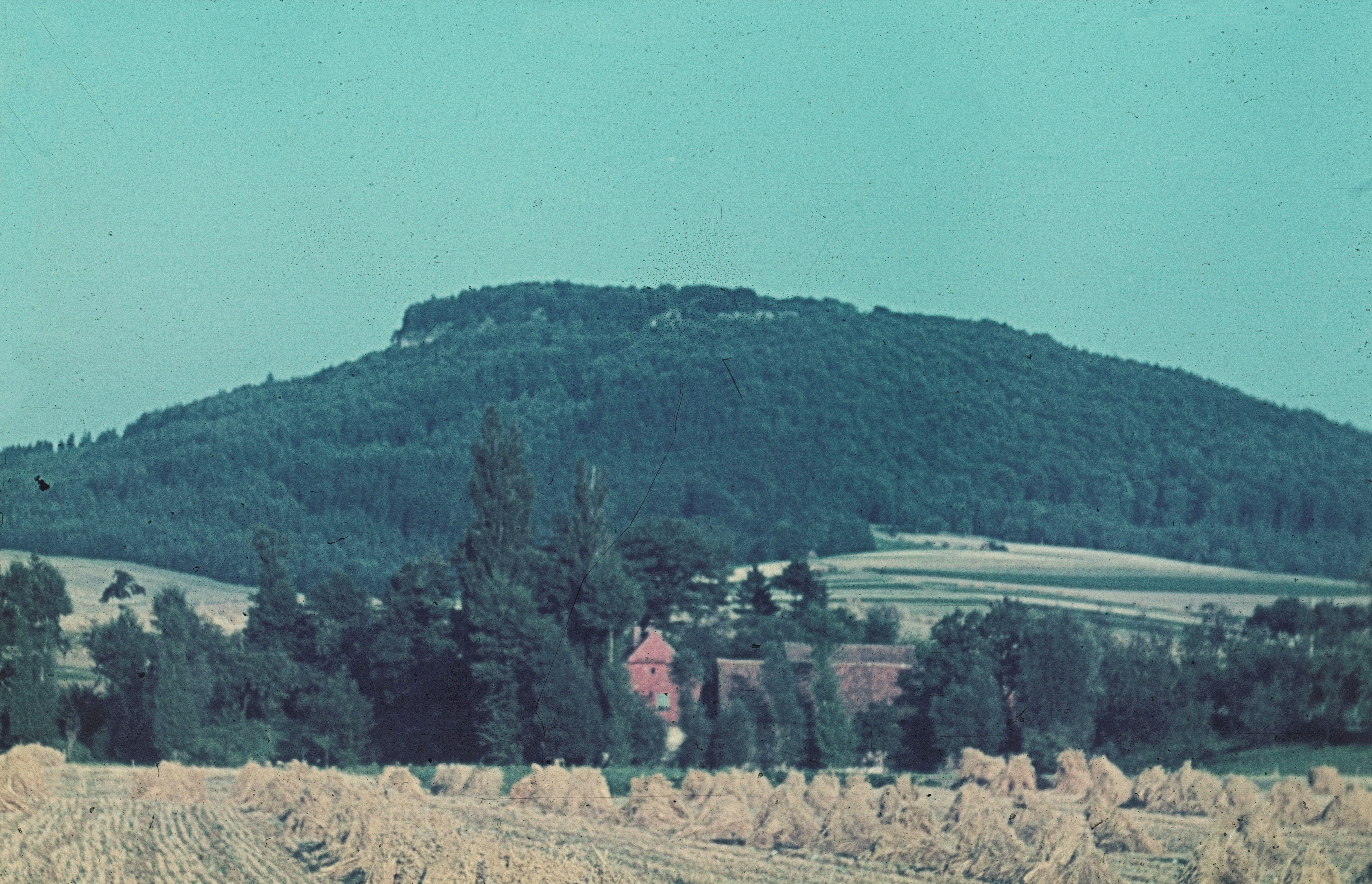 Die Hasenburg bei Haynrode (im Vordergrund die Obermühle)